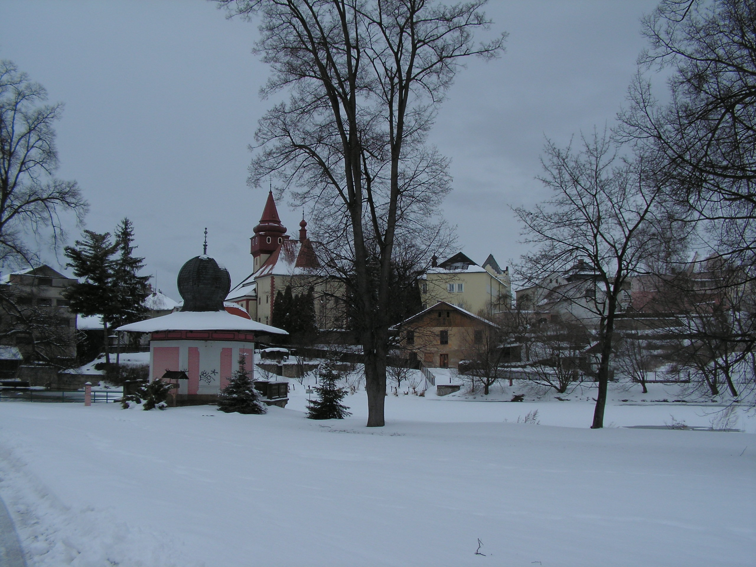 Světlá nad Sázavou v březnu 2005. Zhruba uprostřed snímku je zachycena synagoga, která byla zbořena o rok později.